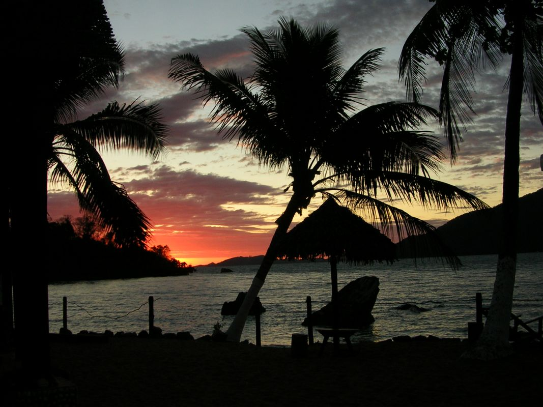 Posta de sol a Nosy Komba (Madagascar)